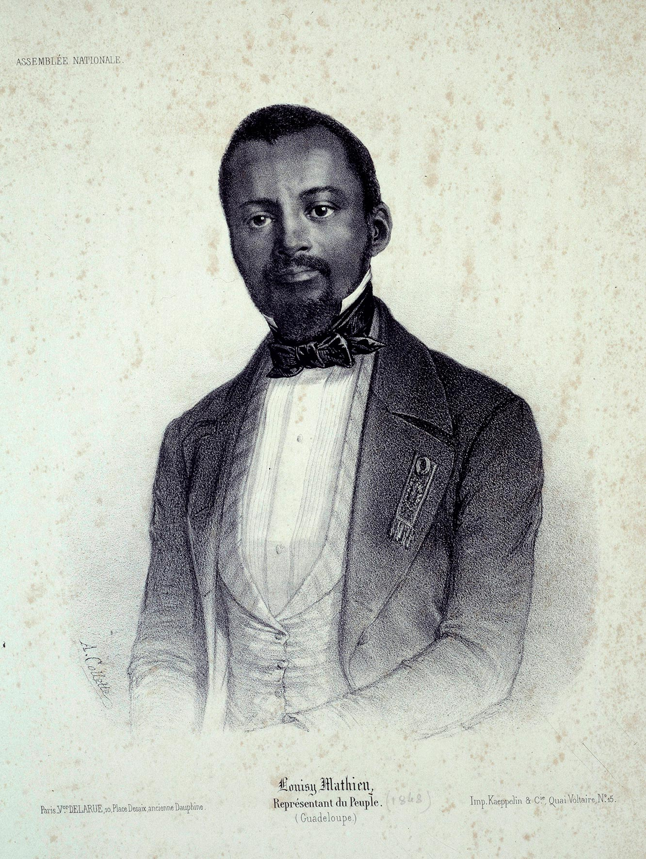 Louisy Mathieu, représentant du peuple (Guadeloupe). Lithographie d'Alexandre Collette.